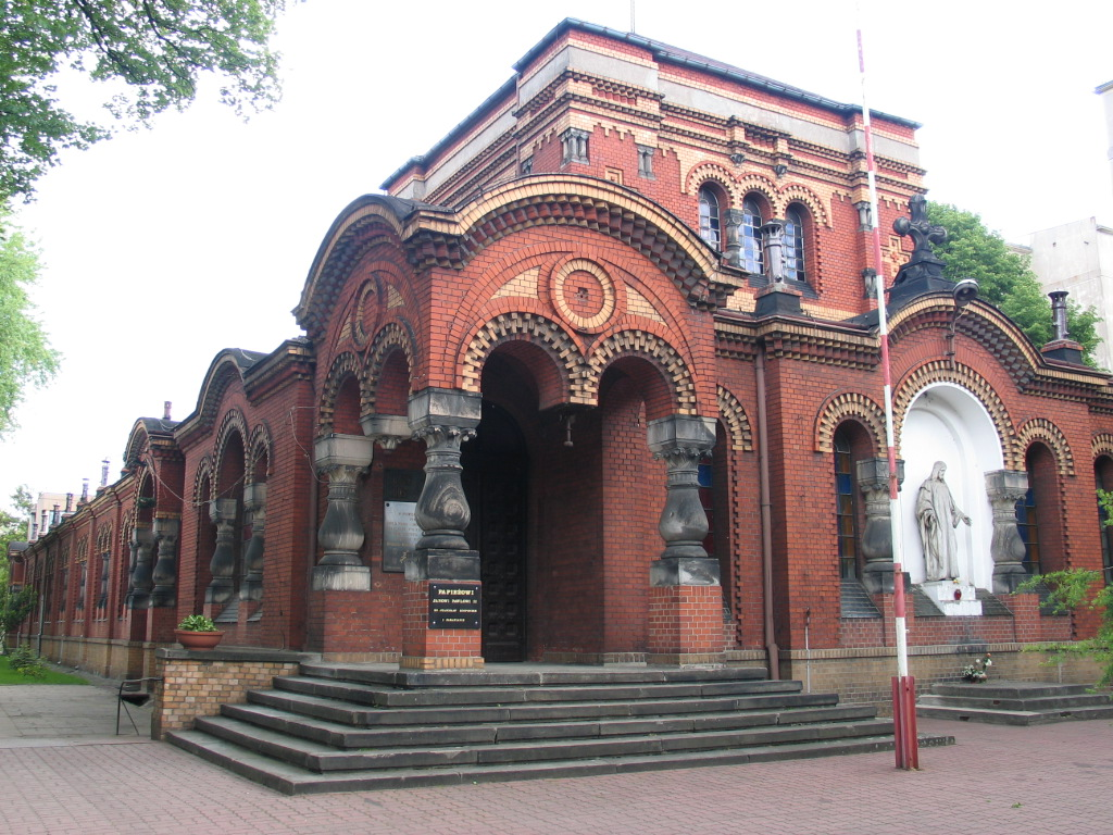 Cerkiew św. Aleksego w Łodzi